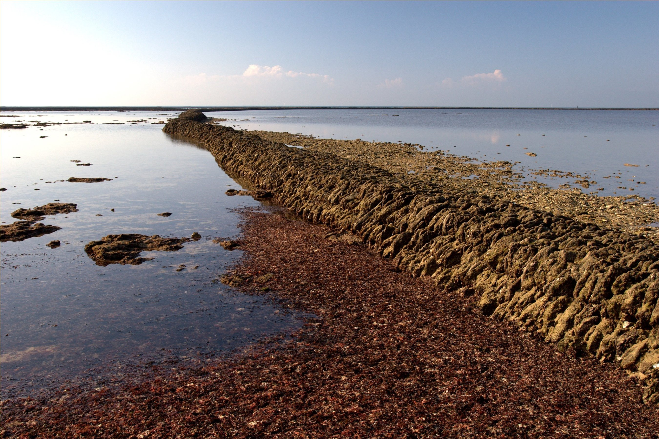 Los Corrales de pesca están considerados Monumento Natural. Se trata de un conjunto de muretes construidos en la fraja intermareal de las playas para aprovechar que la bajamar deja a los peces, moluscos y mariscos atrapados. Es una forma de pesca tradicional que se empezó a utilizar en esta zona de Cádiz desde la época romana .